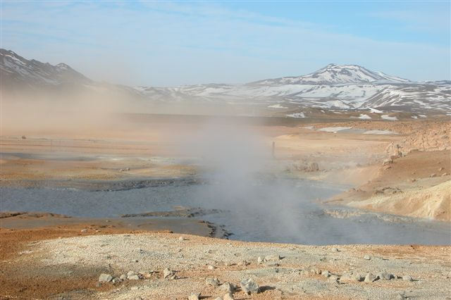 Landscape, Námaskard